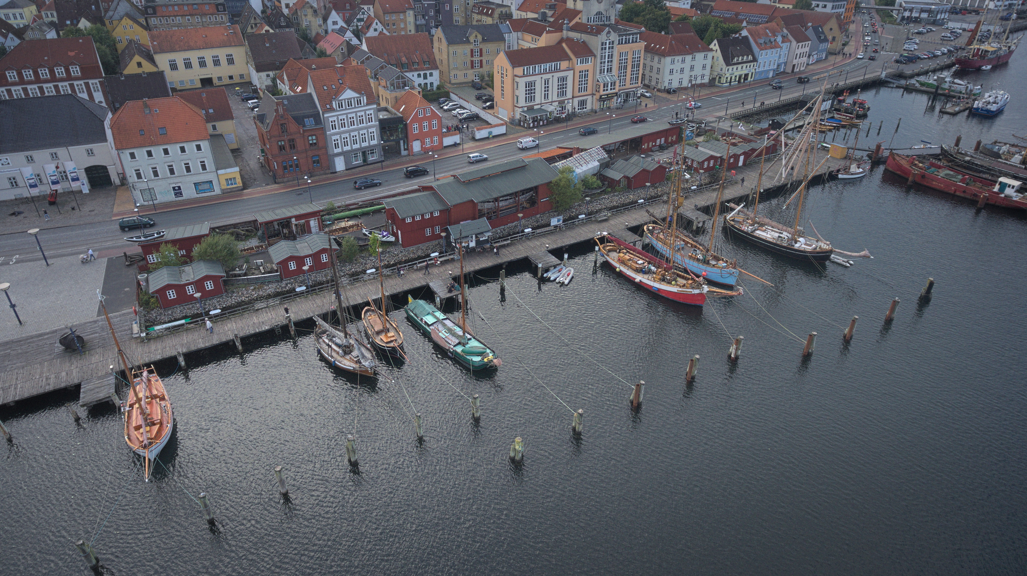 Draufsicht auf den Museumshafen Flensburg